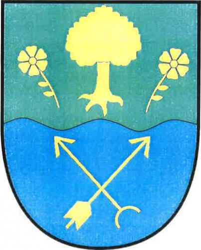 Kněževes (okres Žďár nad Sázavou), znak obce